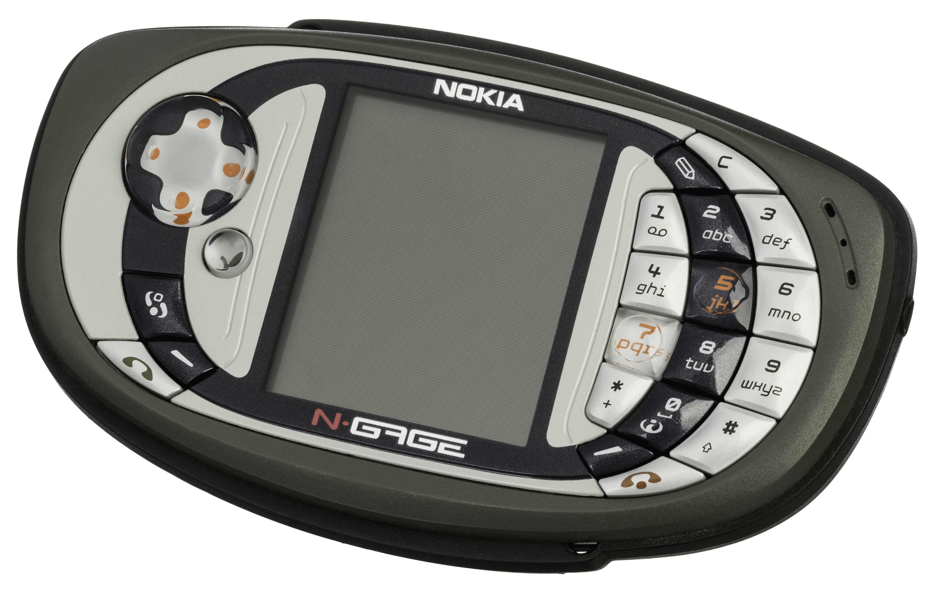 Nokia N-Gage QD - Original File, under public domain: File:Nokia-NGage-QD.jpg